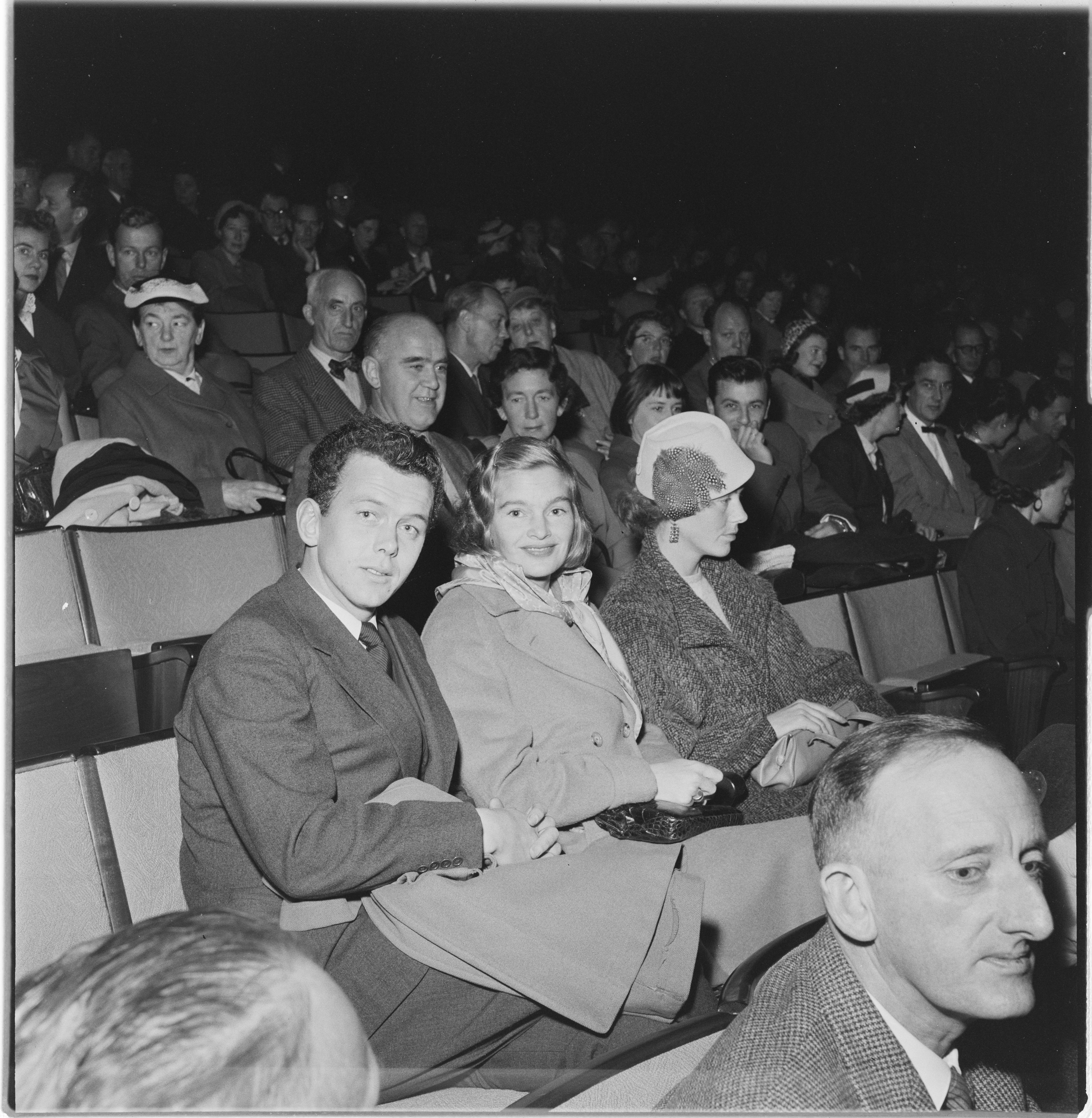 Bildet er hentet fra Arkivverket. Åmodt-prisen til Kr. Åmodt, Tancred Ibsen, Alfred Maurstad og Kåre Bergstrøm. NÅ nr. 43, 1955. Arkivinstitusjon : Riksarkivet Arkivnavn : Billedbladet NÅ Sted : Norge, Oslo, Oslo, Klingenberg kino Emneord: prisutdeling Avbildet